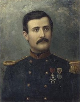 Napoléon Charles Grégoire Jacques Philippe Bonaparte, 5th Prince of Canino and Musignano